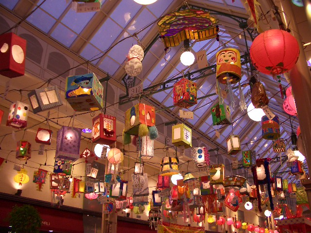 2004 Lantern Festival in Nagasaki, Japan - Lanterns